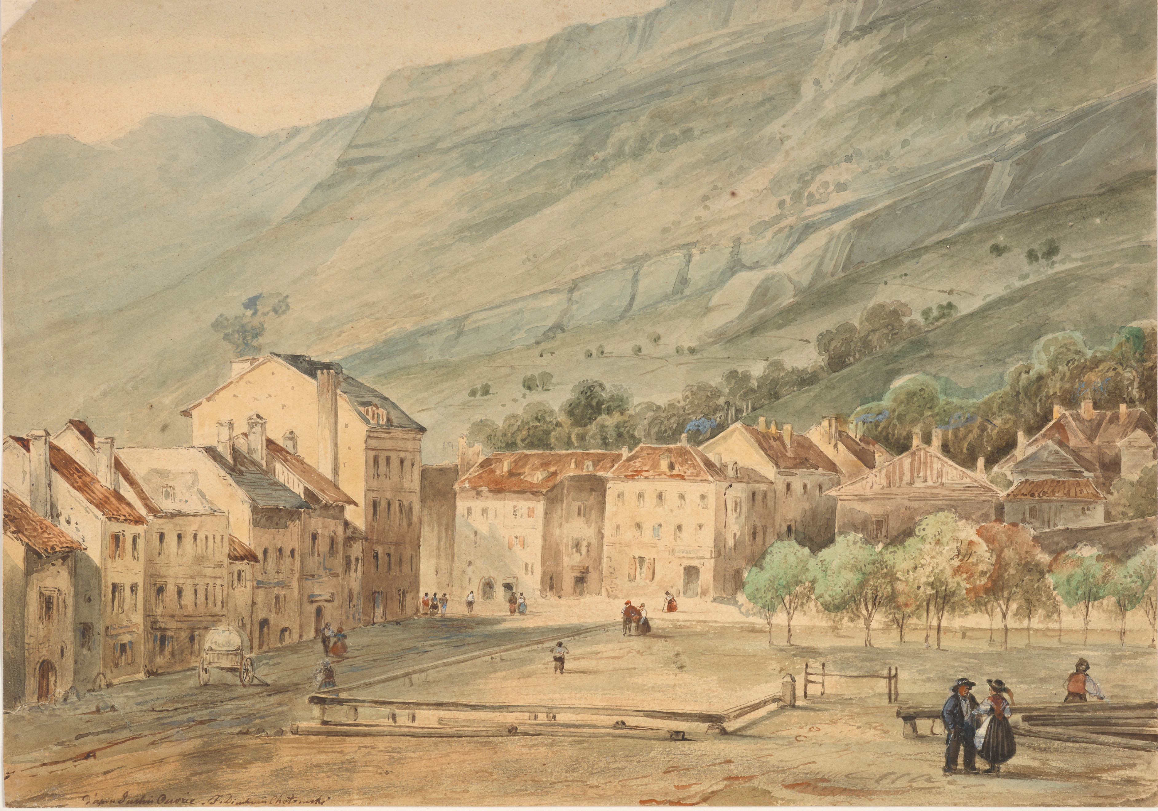 Pejzaż z widokiem miasta, Ferdynand Chotomski